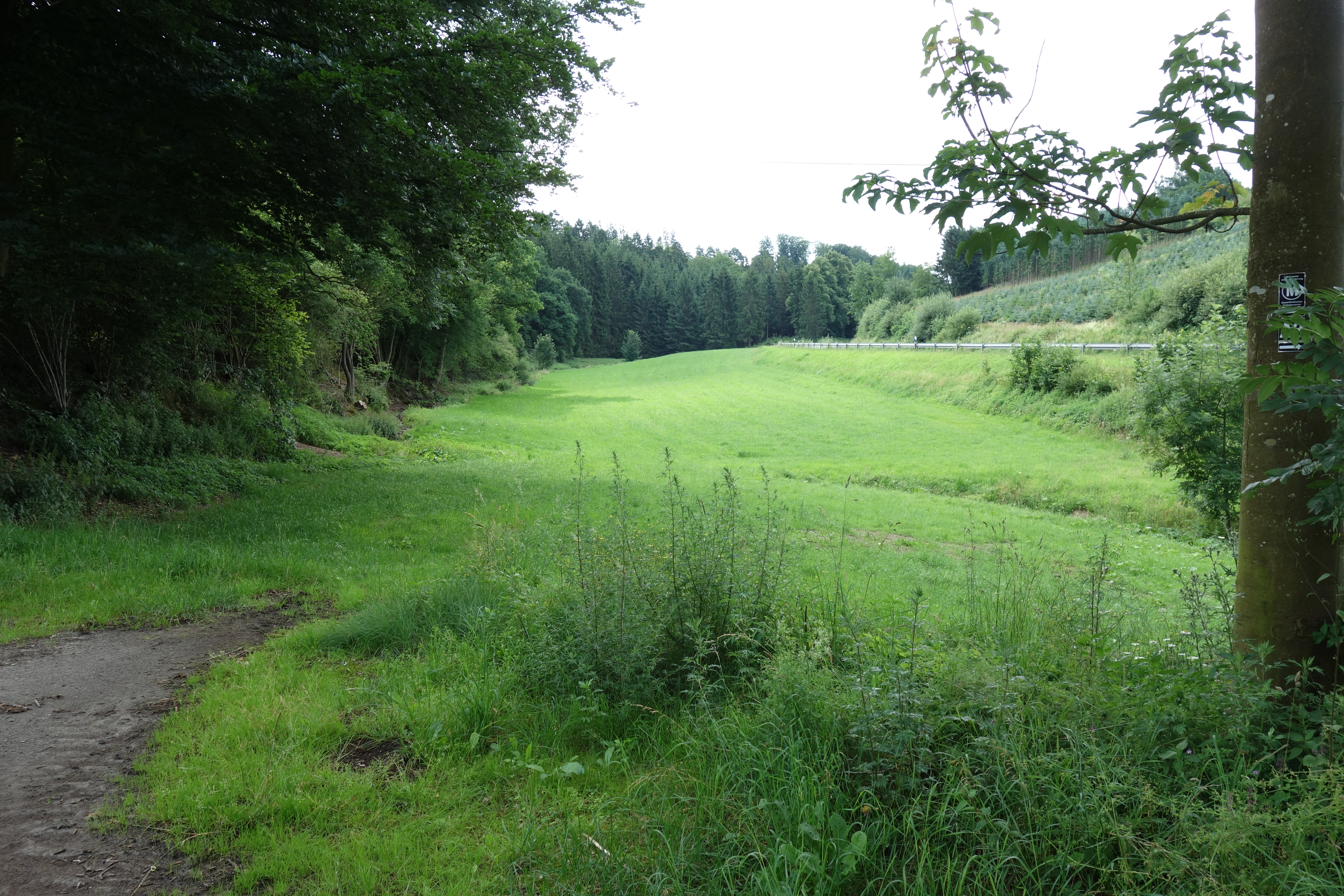 Grünland gehört zum Landschaftsschutzgebiet Talräume der Kleinen Henne zwischen Löttmaringhausen und Remblinghausen und Wald zum LSG Meschede.